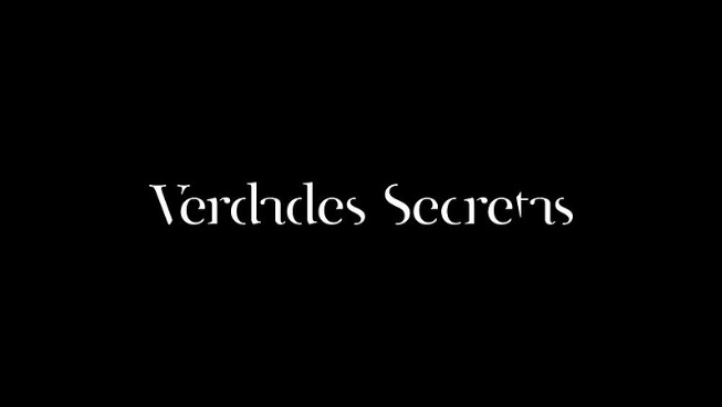 Logotipo da telenovela das onze "Verdades Secretas", produzida e exibida pela Rede Globo em 2015.